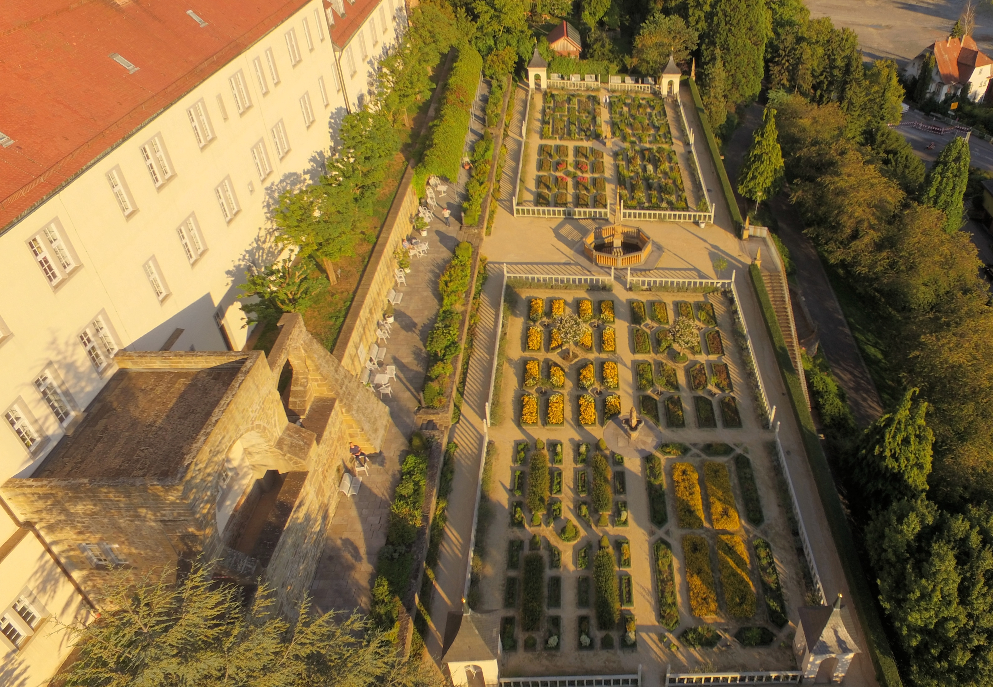 Sonnenuntergang im Schlossgarten